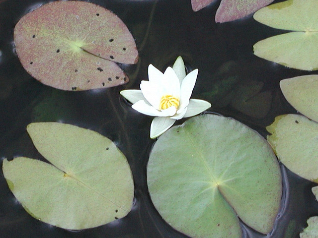 ヒツジグサ （群馬県尾瀬ヶ原で撮影)Nymphaea tetragona var. angusta (Oze, Gunma, JAPAN)